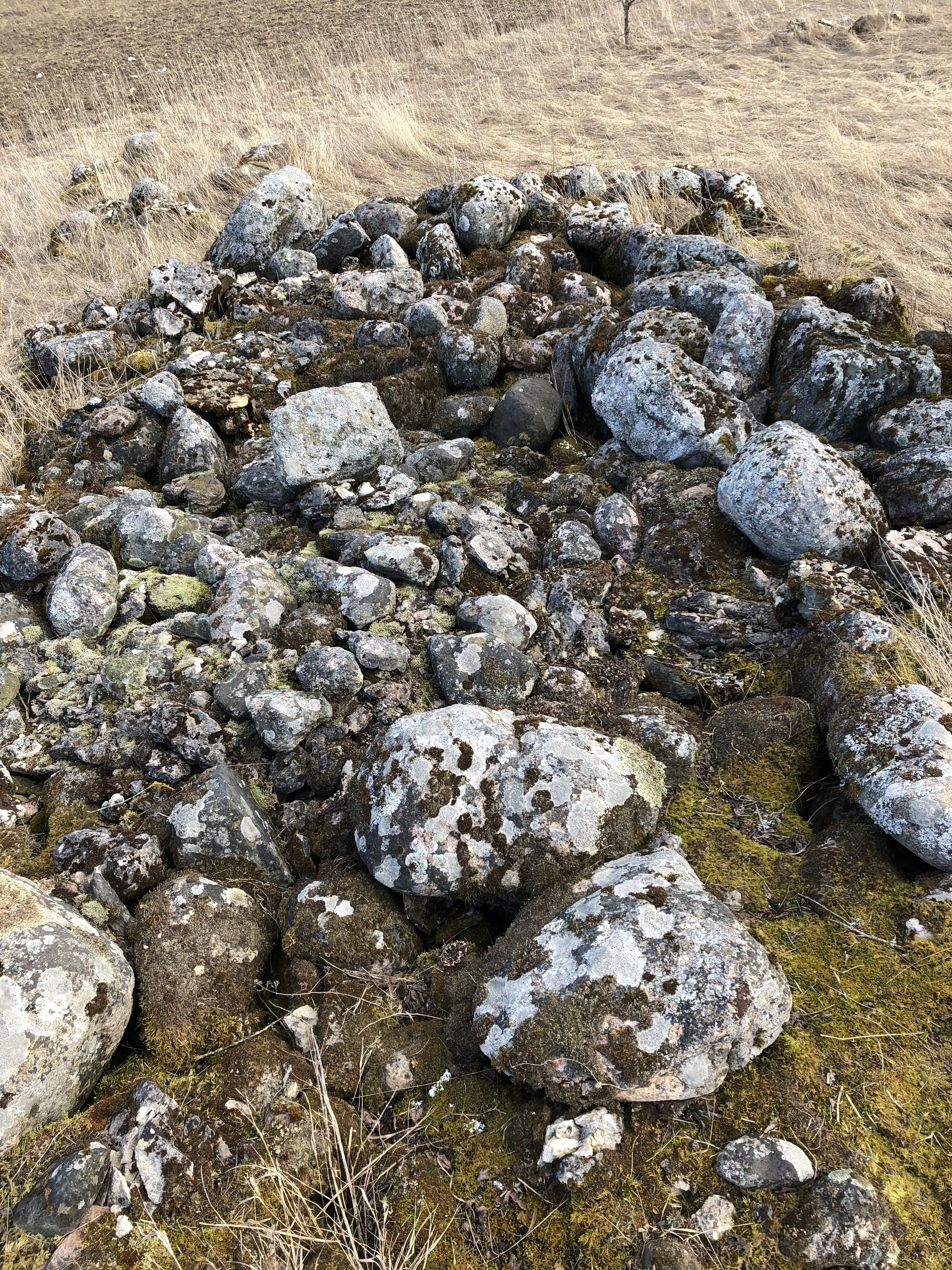 Vana veski vundament